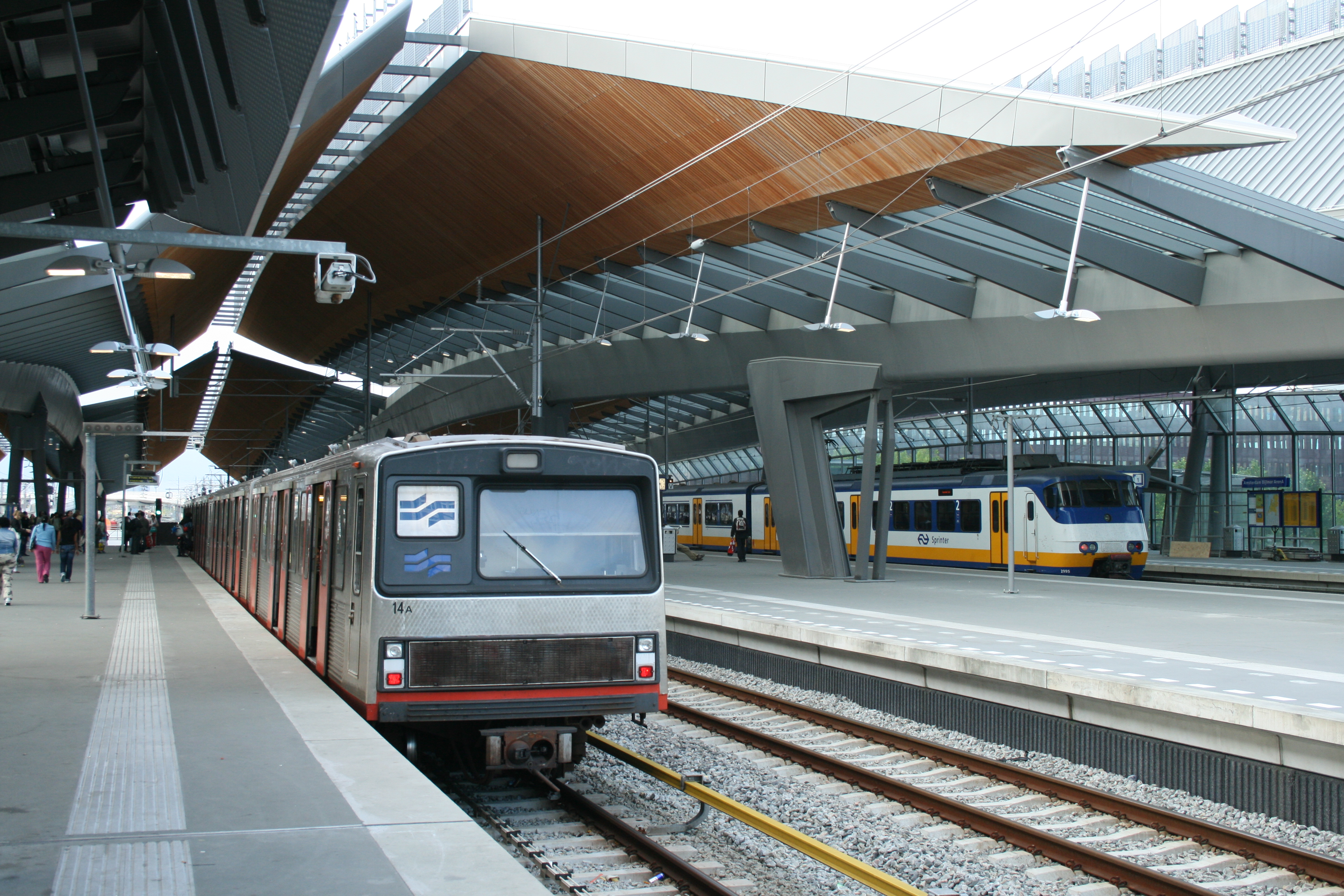 Station Amsterdam Bijlmer Arena, metroperron